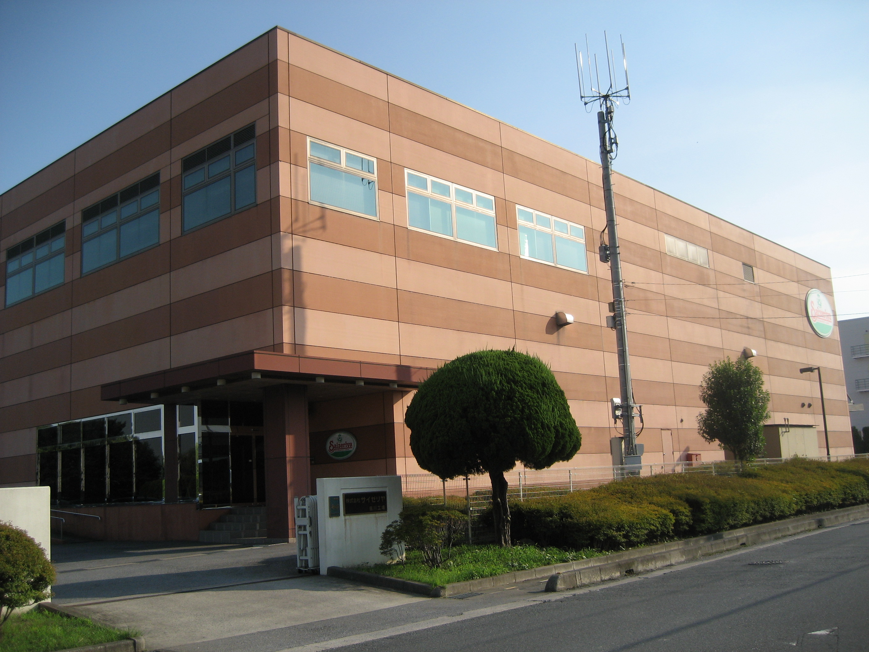 サイゼリヤ吉川工場